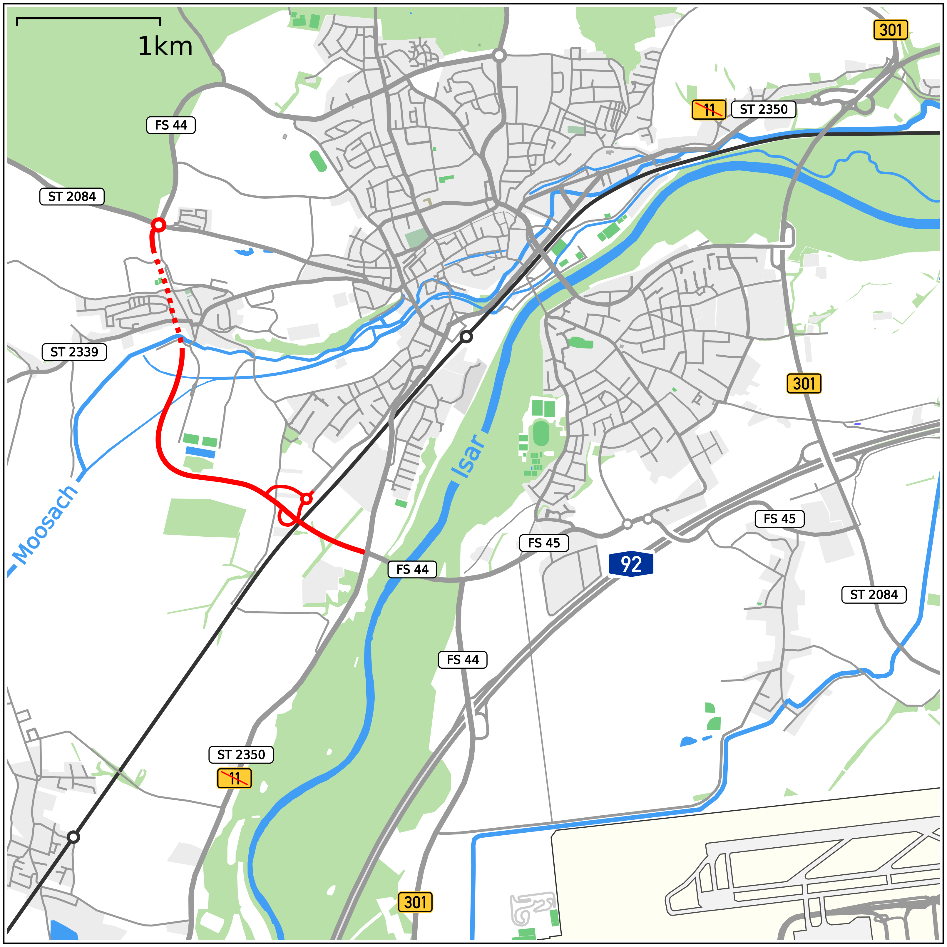 Karte der Westtangente Freising